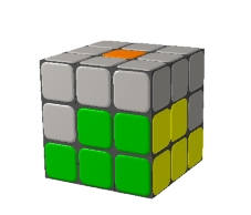 cubo Rubik Dibujo realizado por Josemanuel